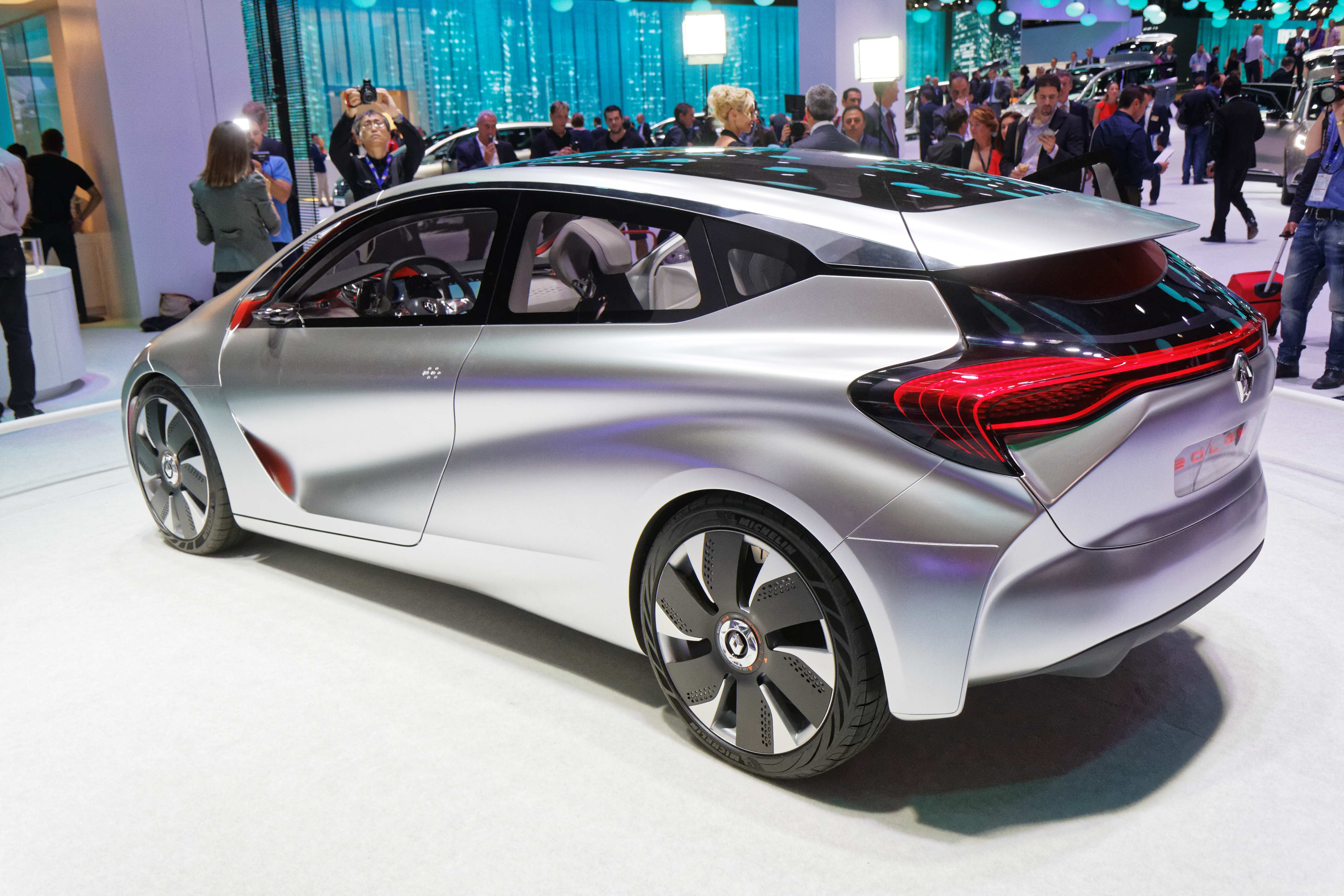 Une Renault Eolab présentée lors du mondial de l'automobile de Paris 2014.